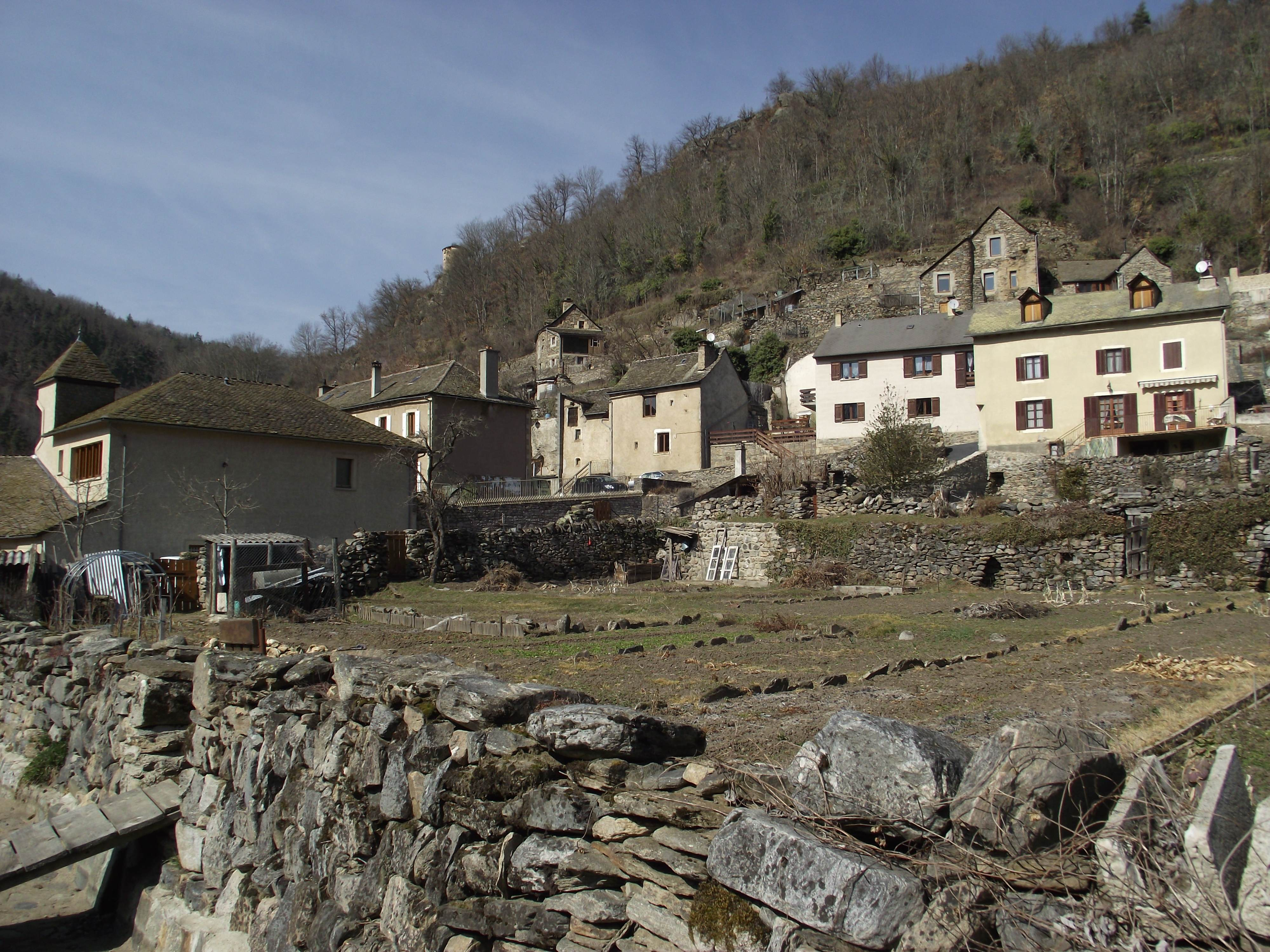 Village de St-Léger-de-Peyre dans la vallée de la Colagne au nord de Marvejols (Lozère)